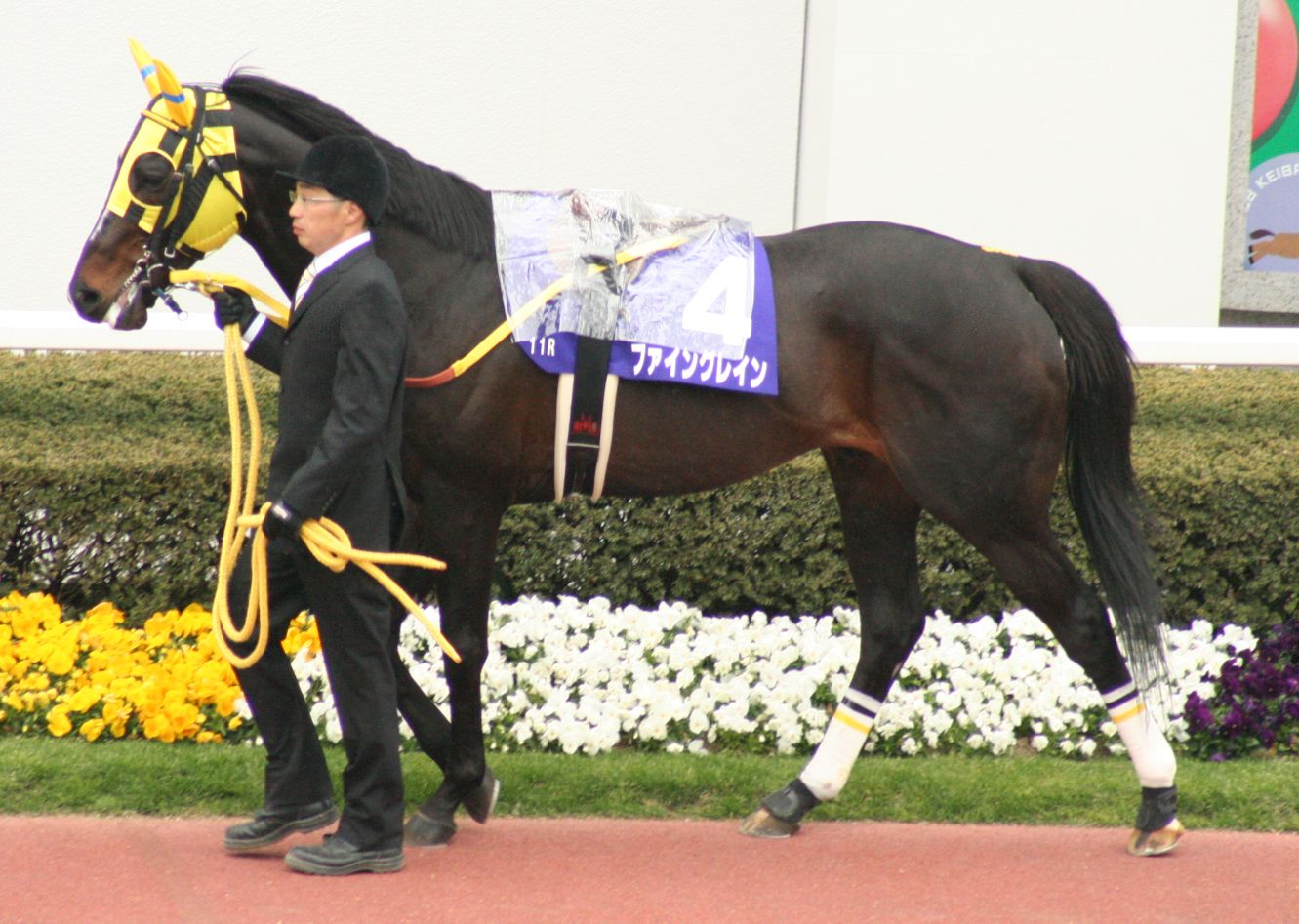 ファイングレイン (Fine Grain)